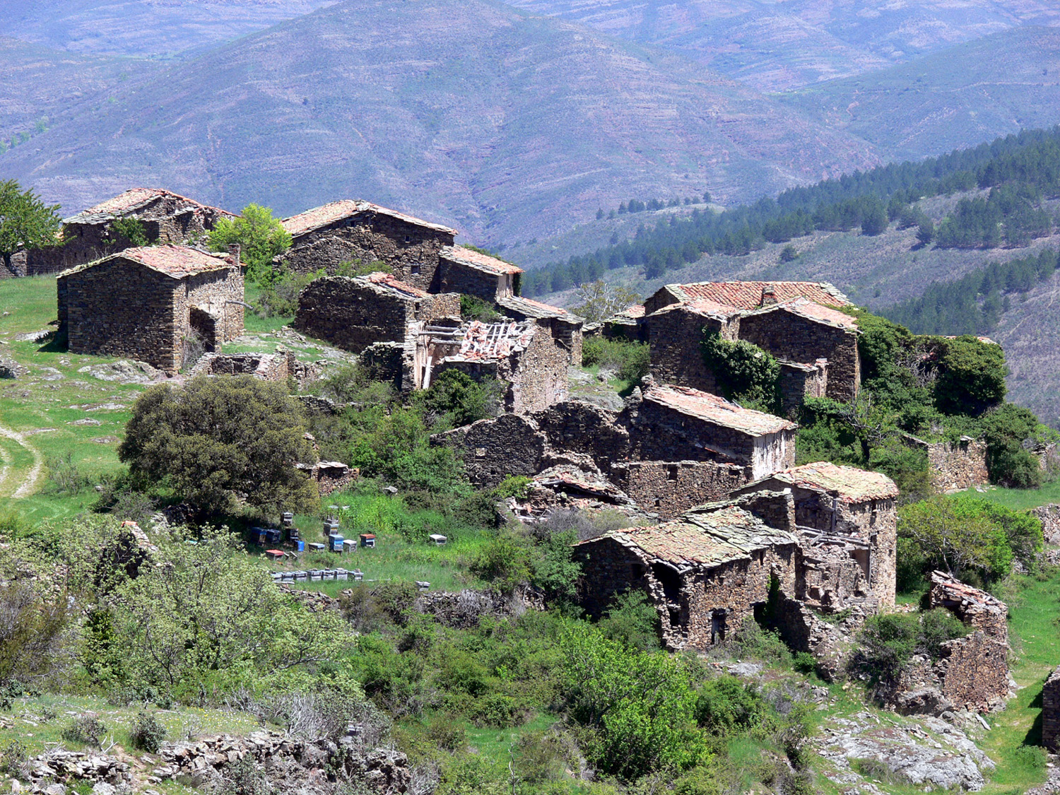 Ribalmaguillo, despoblado de Munilla, La Rioja - España.